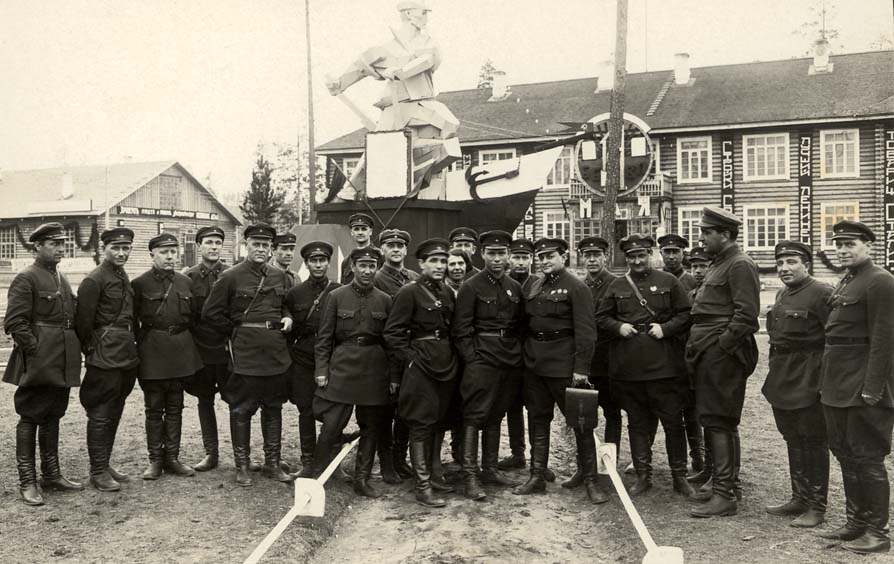 руководства и начальников крупных лагерей ГУЛАГ. (Матвей Давидович Берман, Семён Григорьевич Фирин и др.)